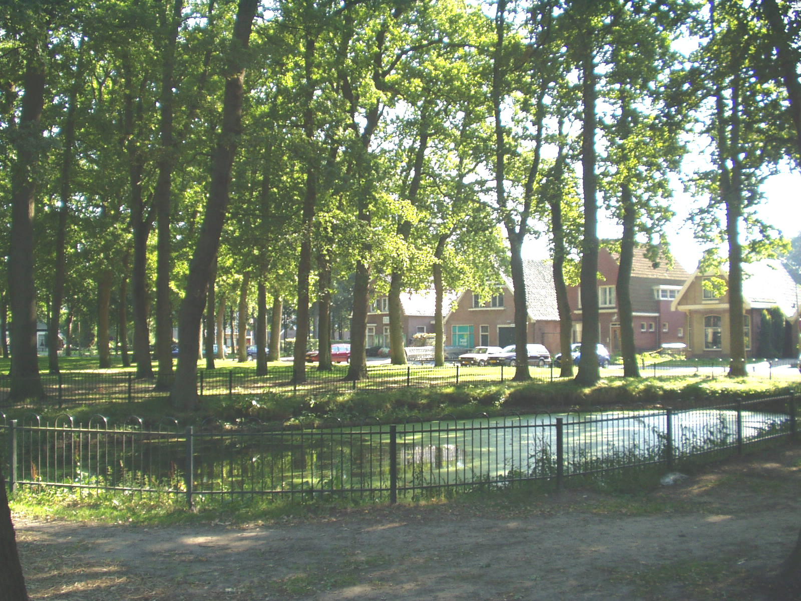 Zuidlaren, vilaĝcentra placo.